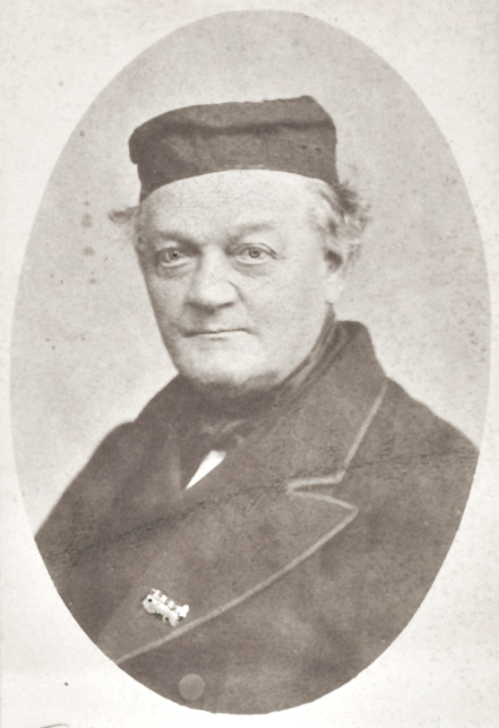 Johann Georg Lehmann (1797-1876), prot. Pfarrer und Heimatforscher bzw. heimatkundlicher Autor in der Rheinpfalz.